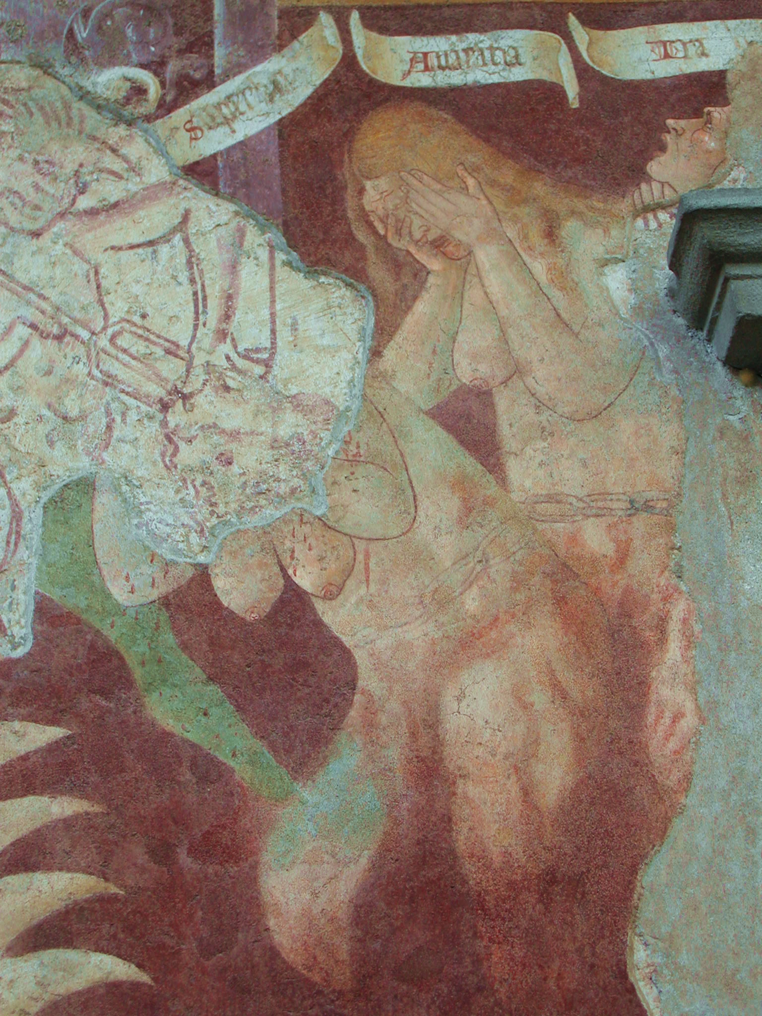 Clusone, Italy, oratorio dei disciplini